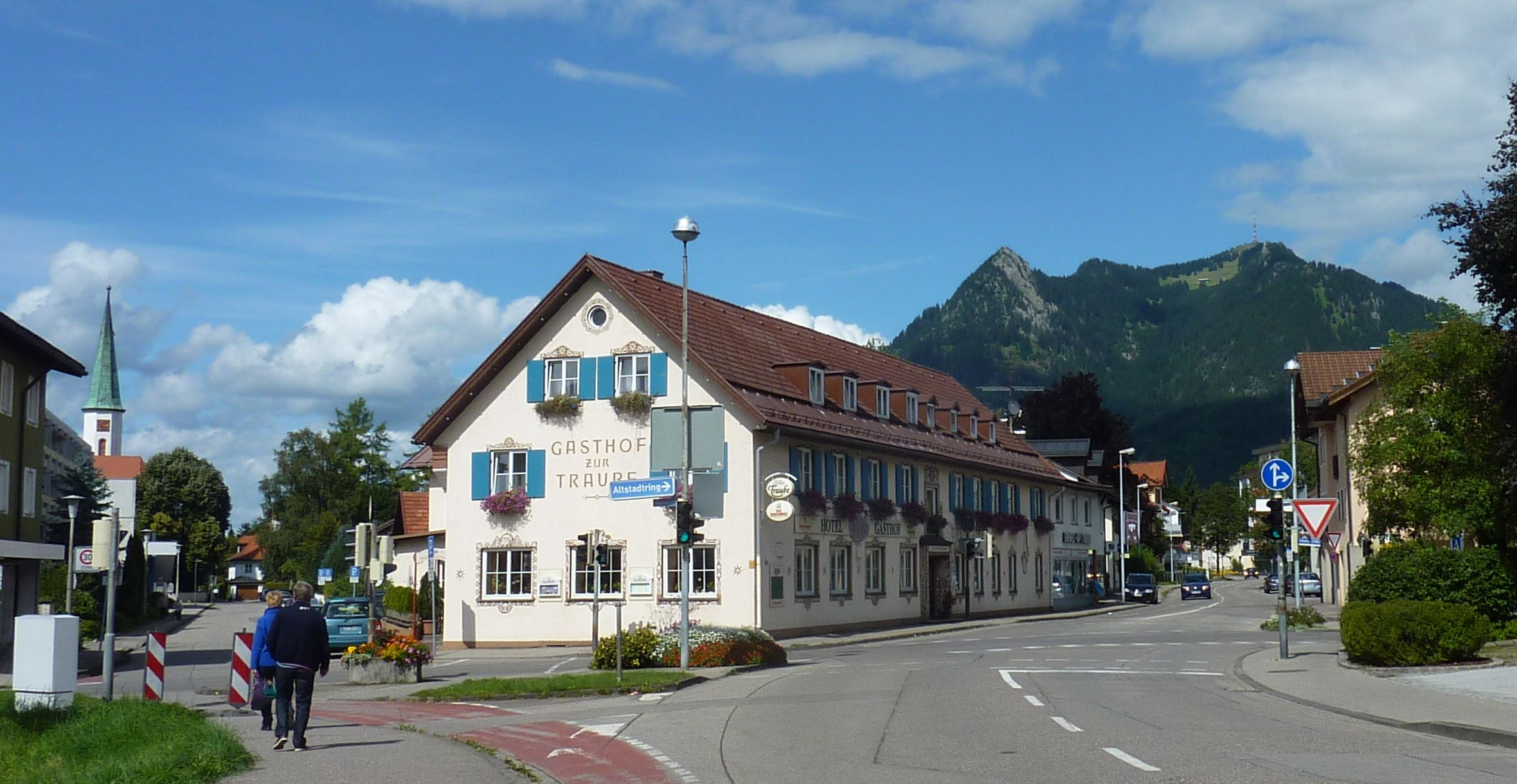 Gasthof Traube und Grünten in Sonthofen